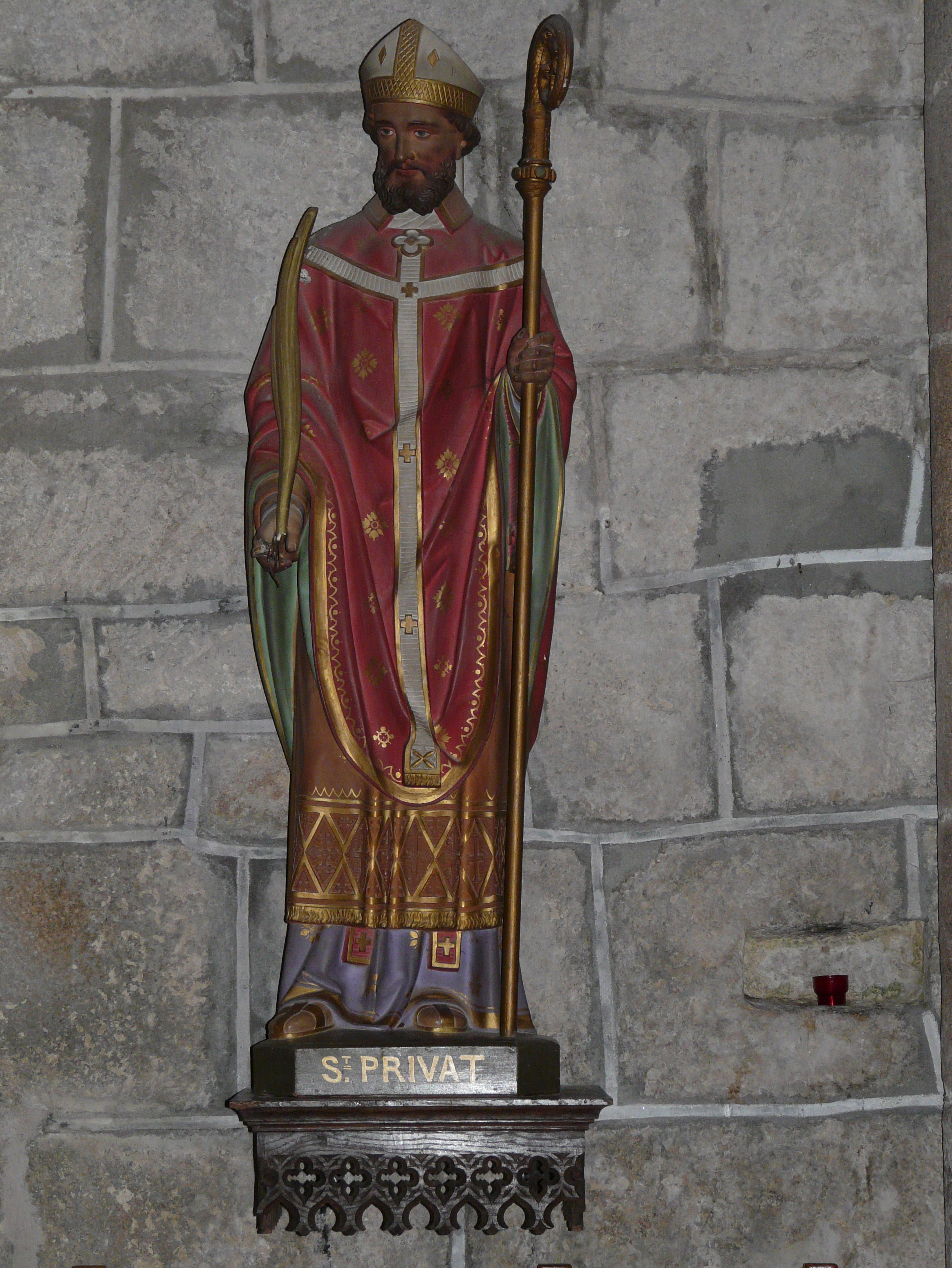 Statue représentant saint Privat, église Saint-Privat de Saint-Privat, Corrèze, France.